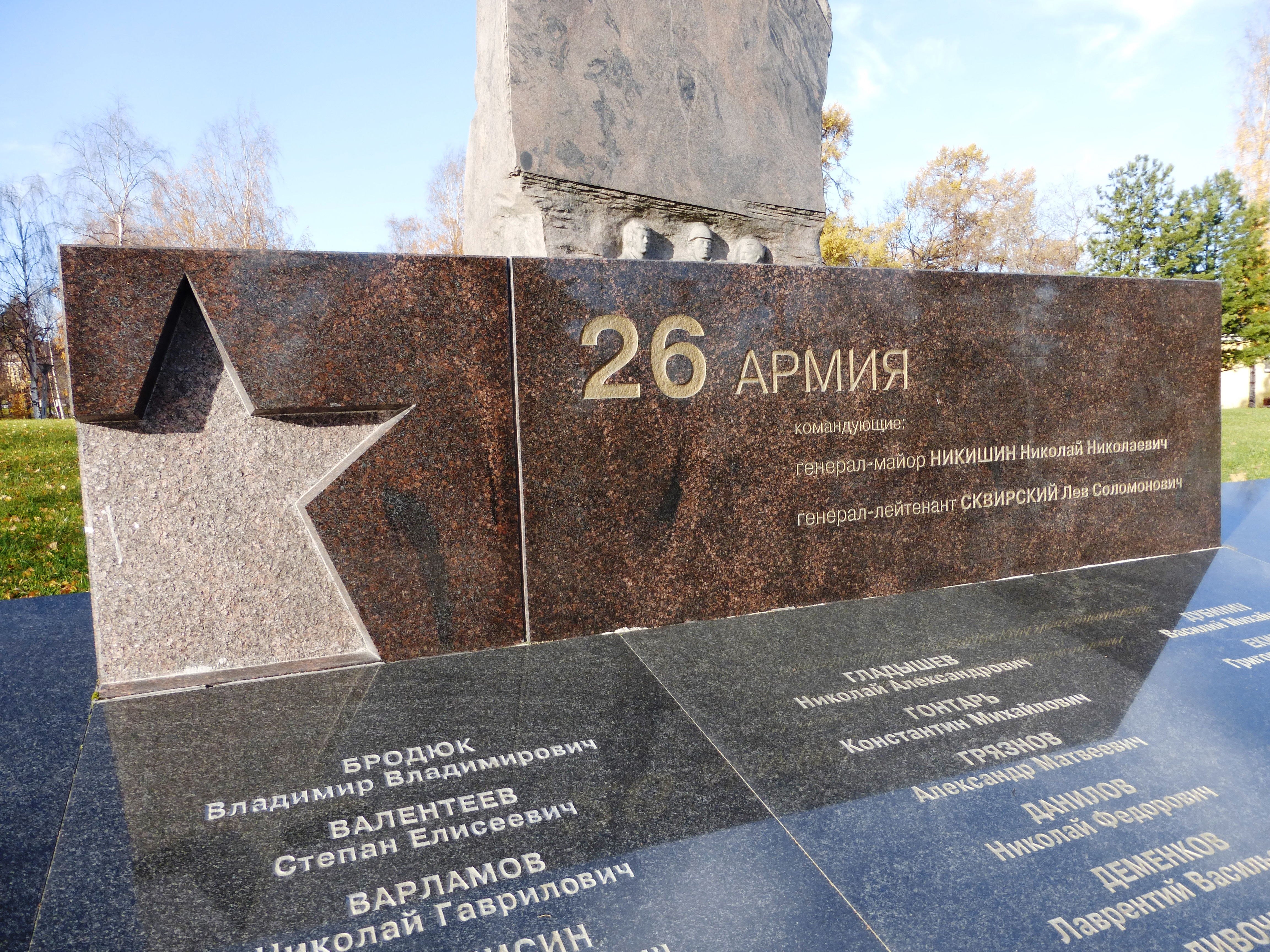 Фрагмент военно-мемориального комплекса Карельского фронта «Аллея памяти и славы» в Петрозаводске